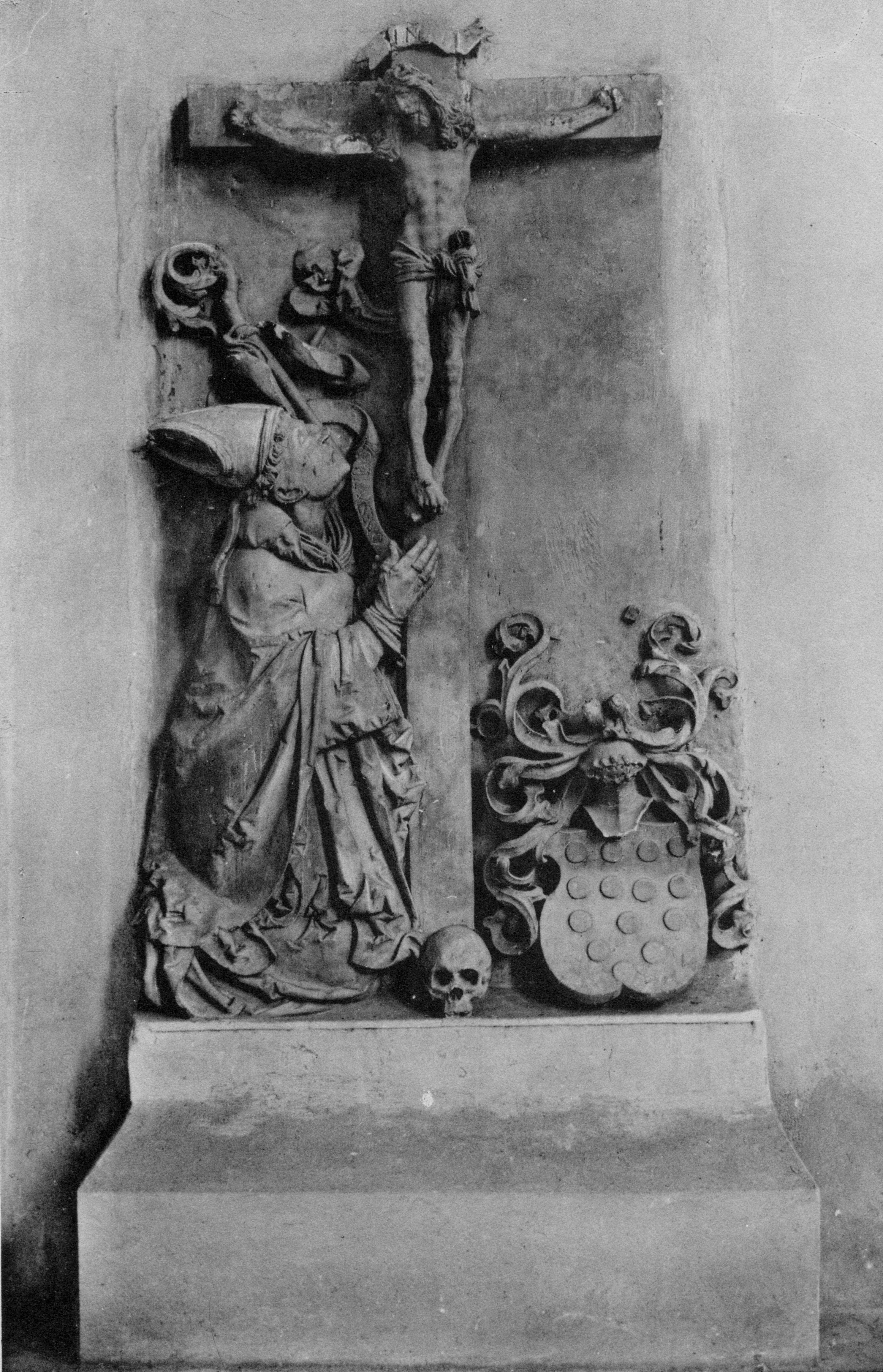 Sandsteinepitaph für Bischof Dietrich von Bülow in der Domkirche in Fürstenwalde, Brandenburg, Deutschland